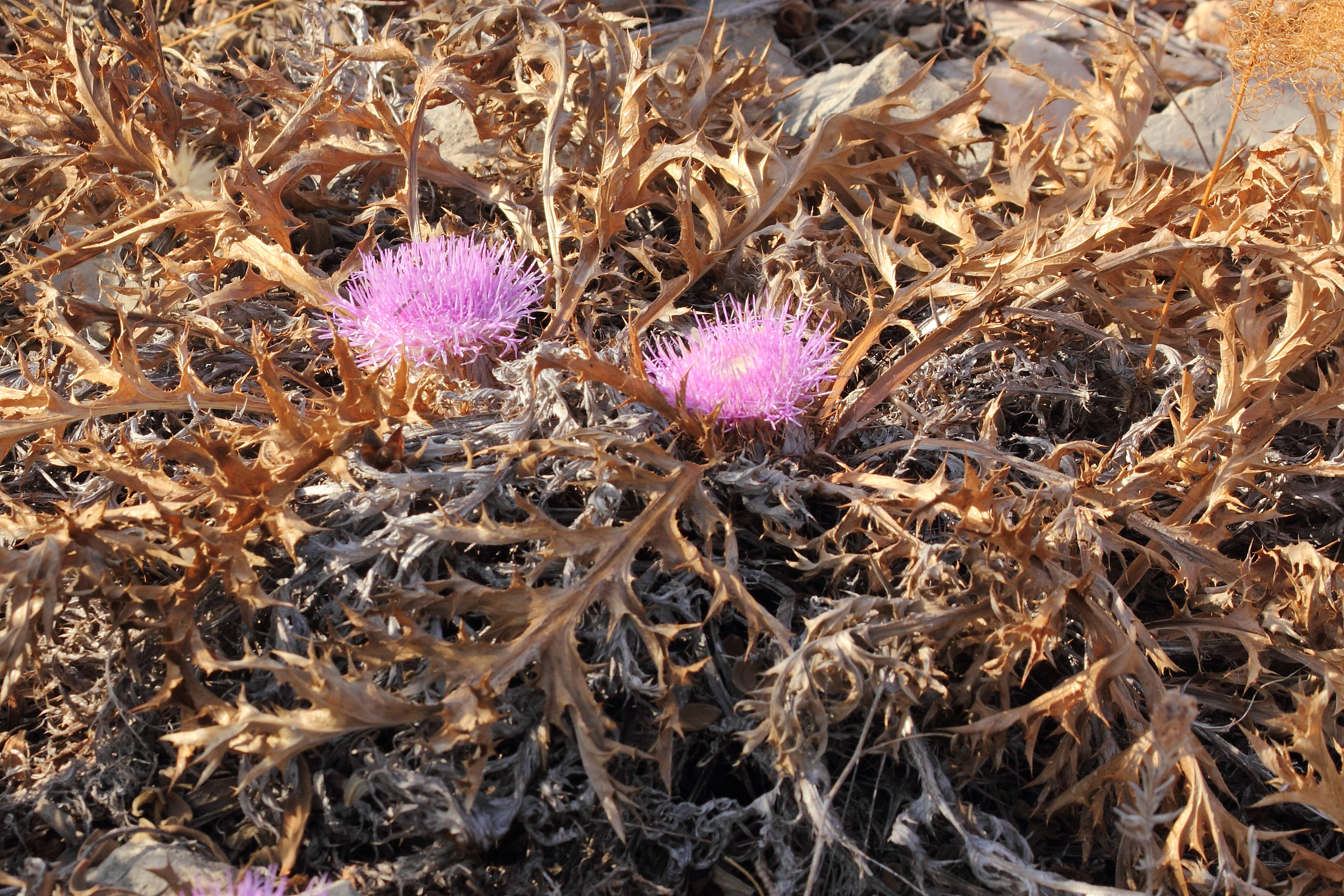 Encontra-se em clareiras de matos, prados e pastagens em solos calcários, sempre em zonas soalheiras e quentes.